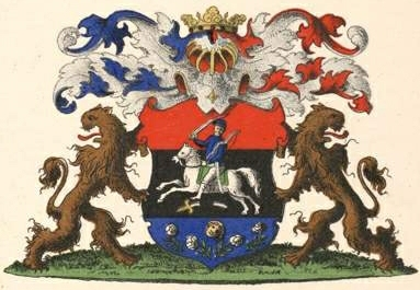 Spiridovi suguvõsa aadlivapp